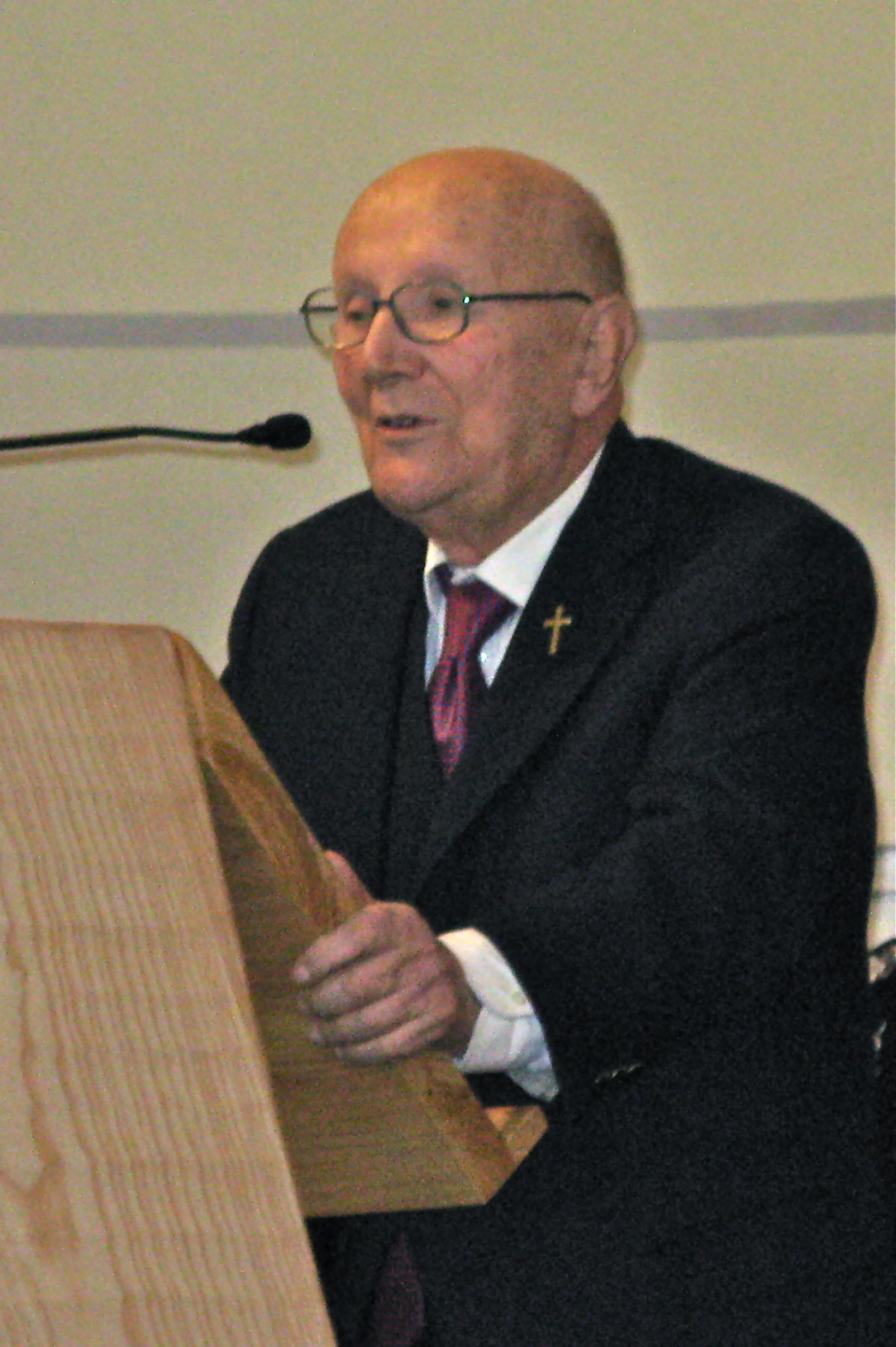 Don Luigi Maria Verzé (14 mar 1920) speaking in Università Vita-Salute San Raffaele, Milan